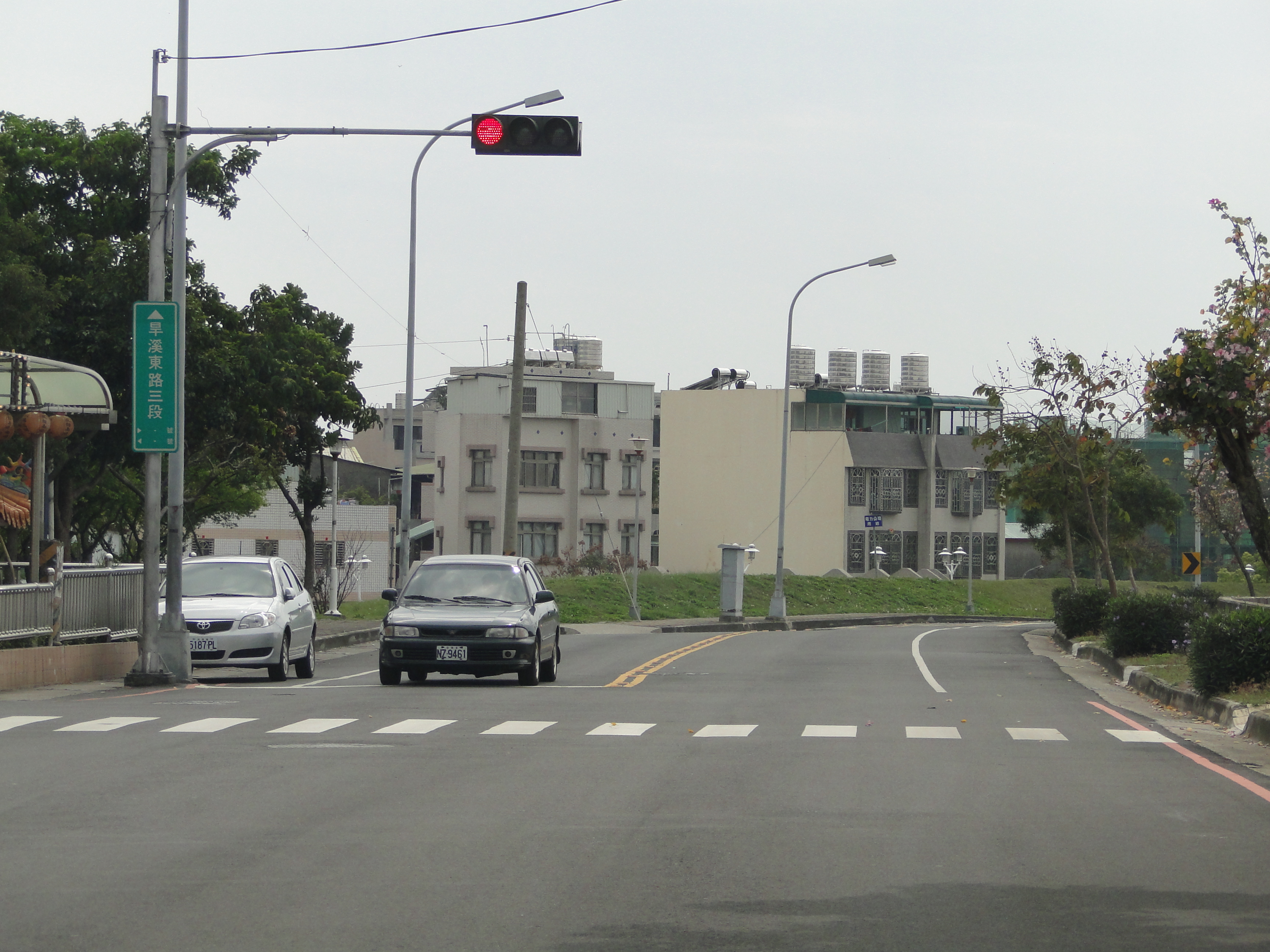 中文（台灣）: 台灣台中市旱溪東路三段一景。